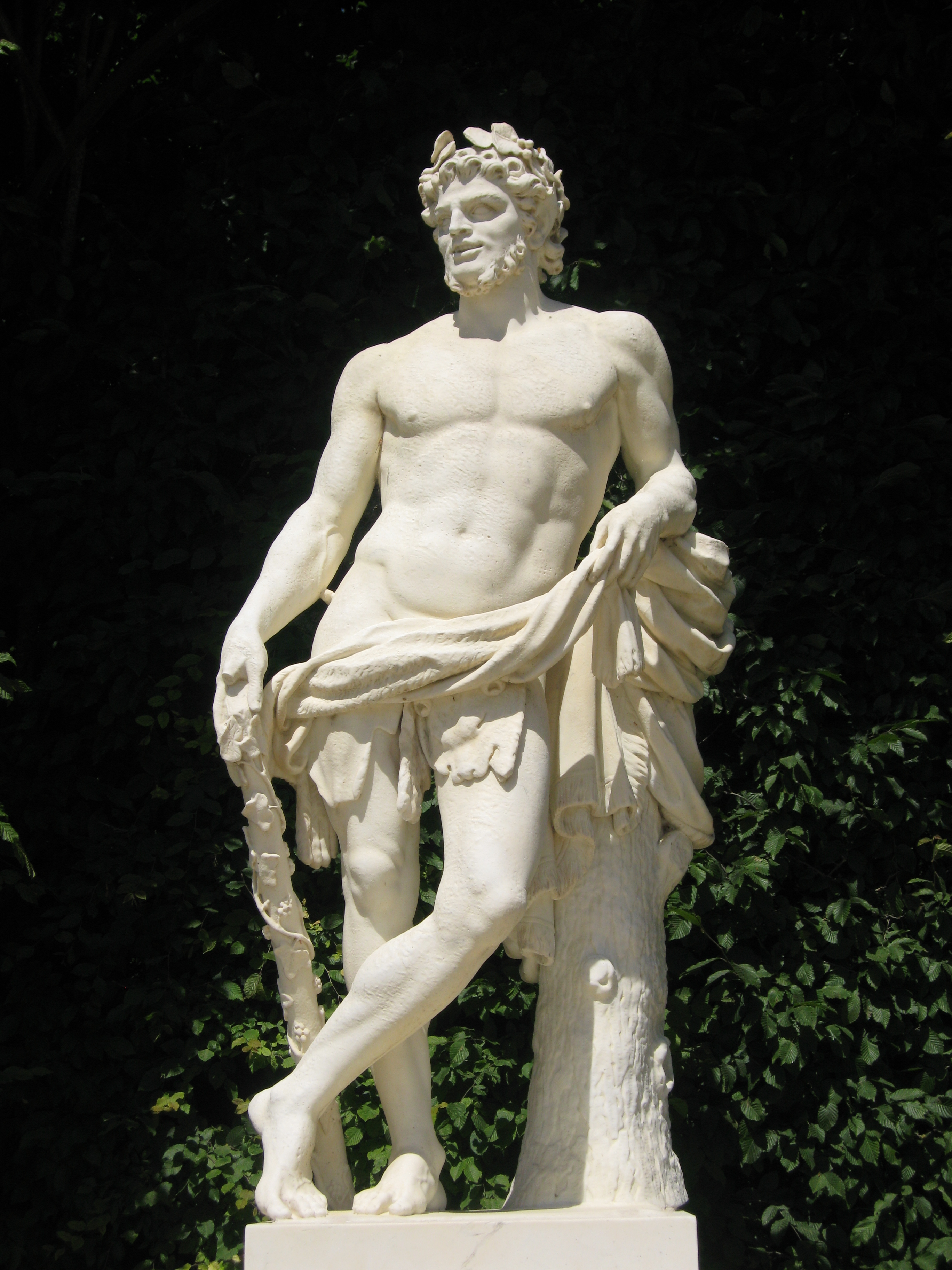 Le Poème satyrique, par Philippe Buyster